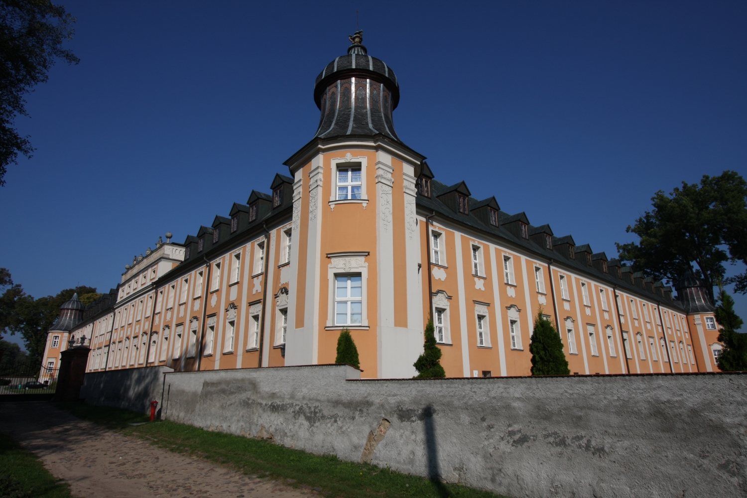 Gościkowo, klasztor, cystersów, mur., XIII, XVIII